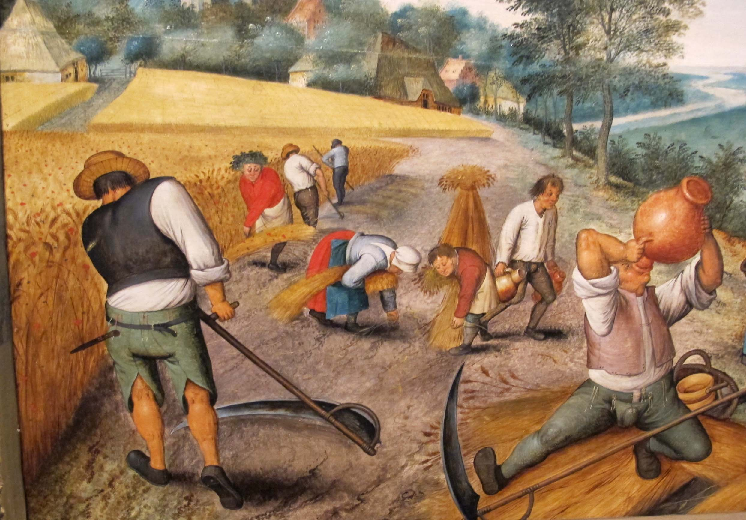 Pieter bruegel il giovane, estate